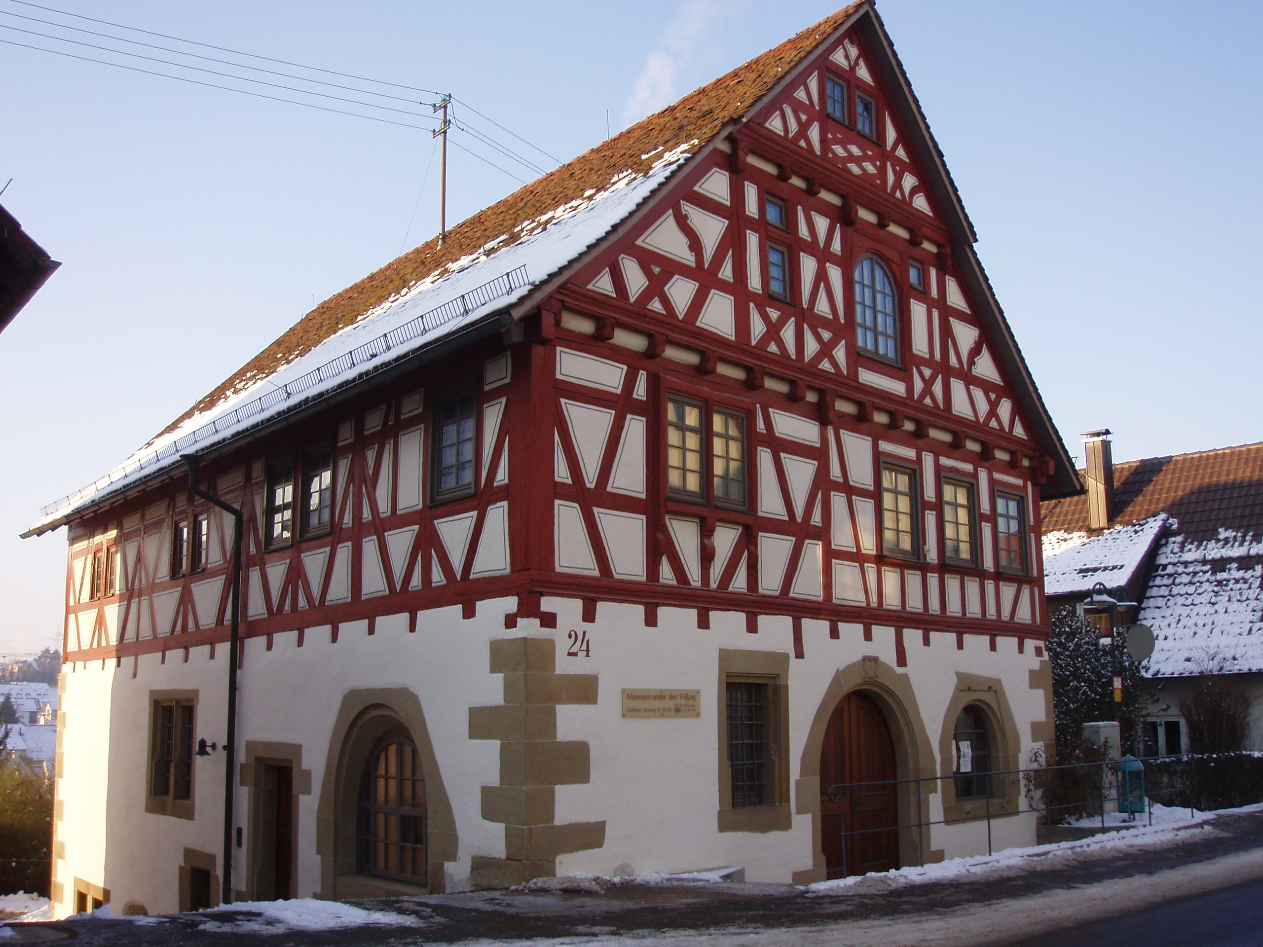 Museum unter der Y-Burg